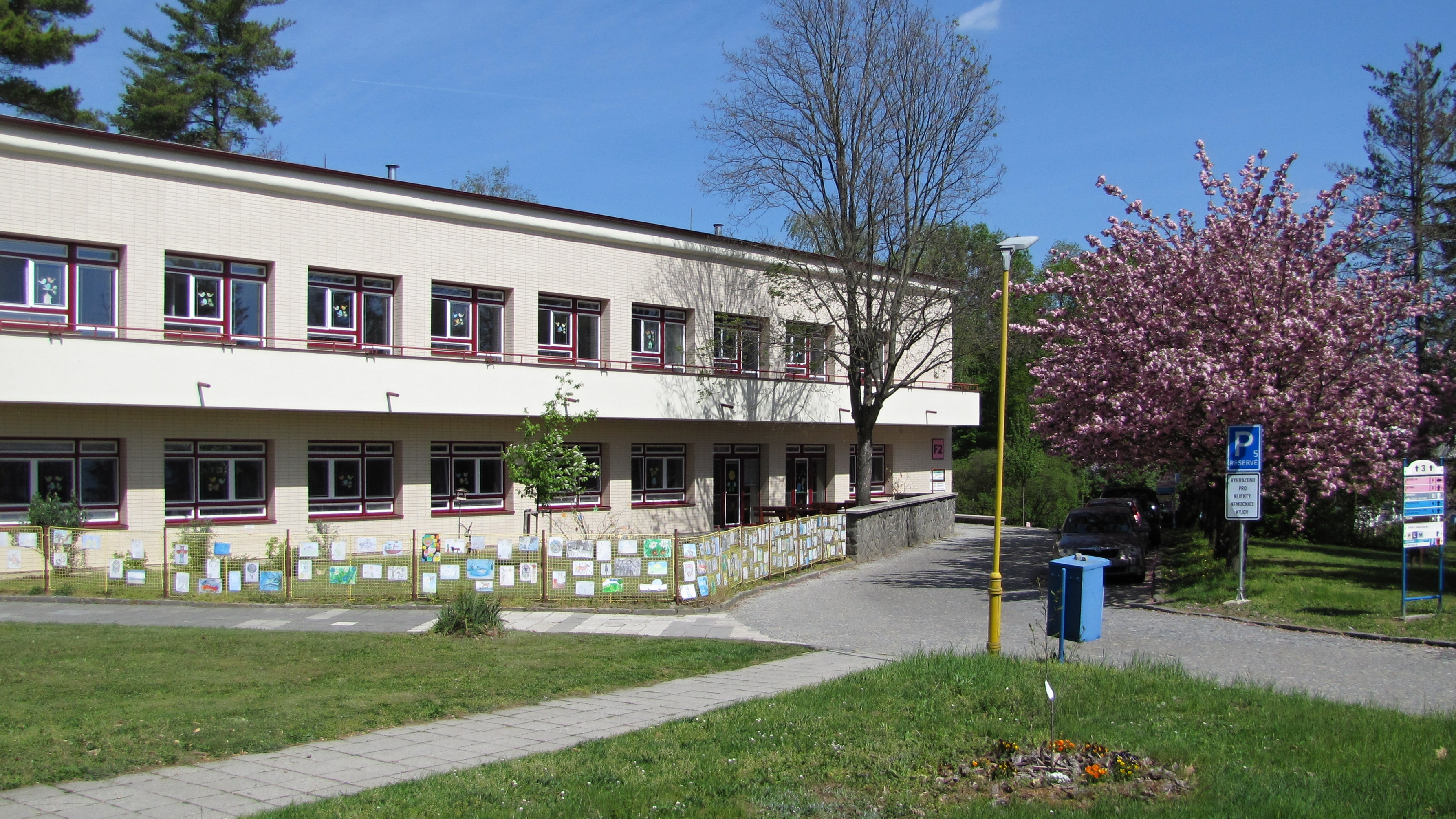 Nemocnice Kyjov, dětské oddělení